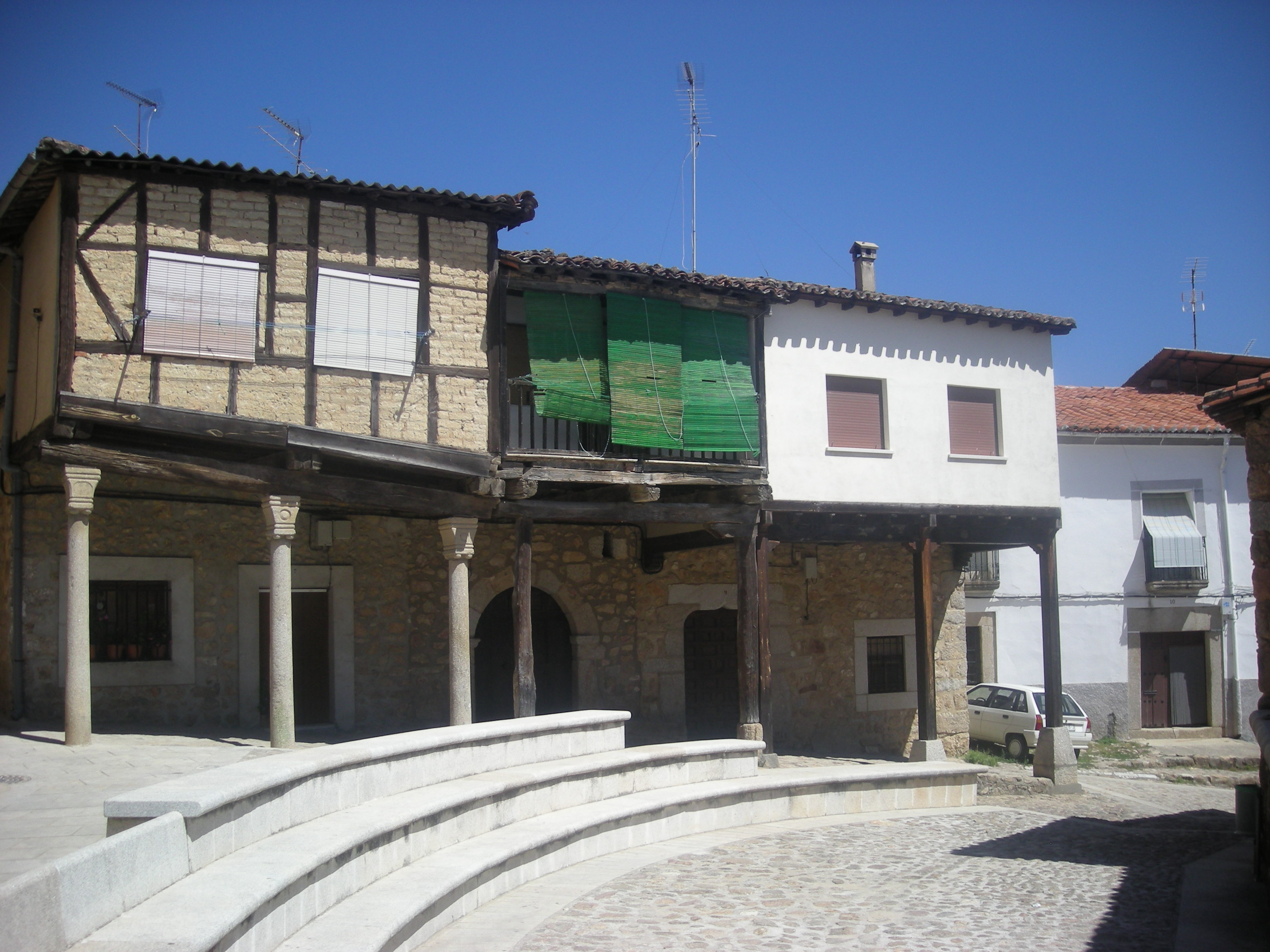 Casa de Don Juan de Austria; Cuacos de Yuste, Cáceres, España.